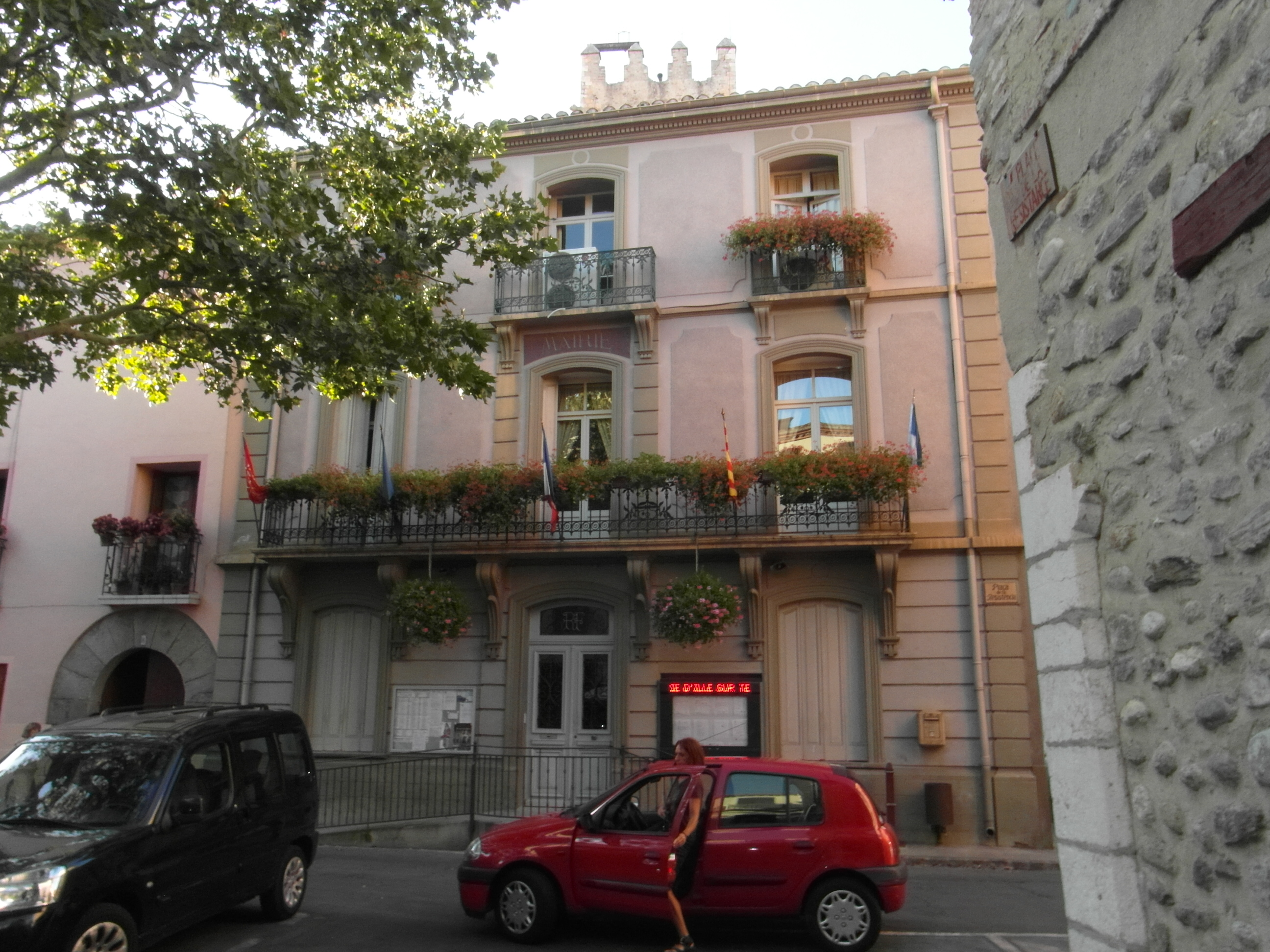 Mairie de Ille-sur-Têt